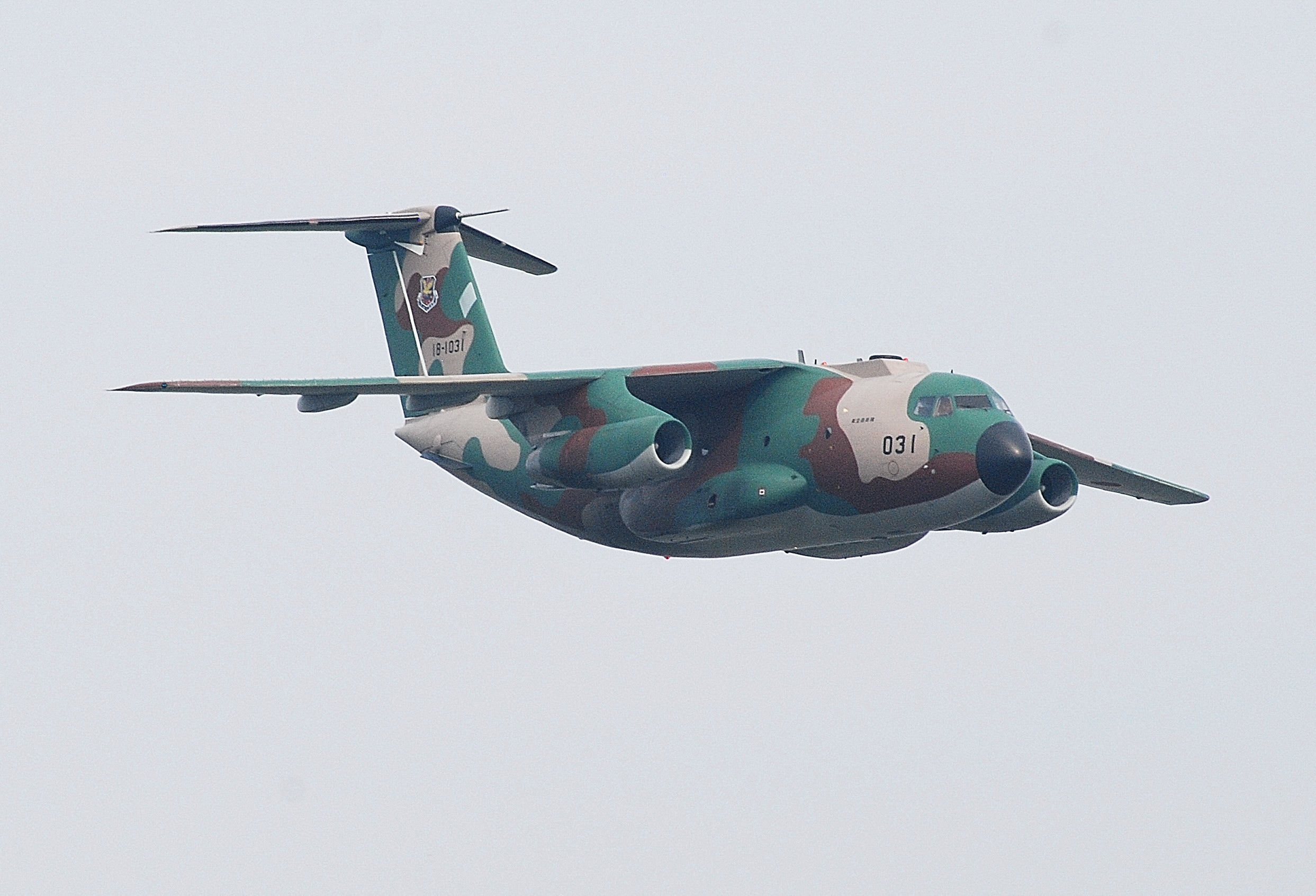 飛行するC-1輸送機（2013年の入間基地航空際にて撮影）